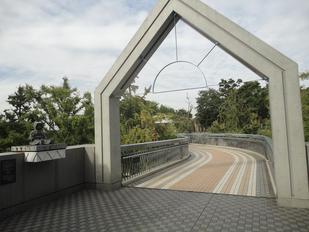 ポーリン橋（横浜人形の家から山下公園方面にかかっている橋）